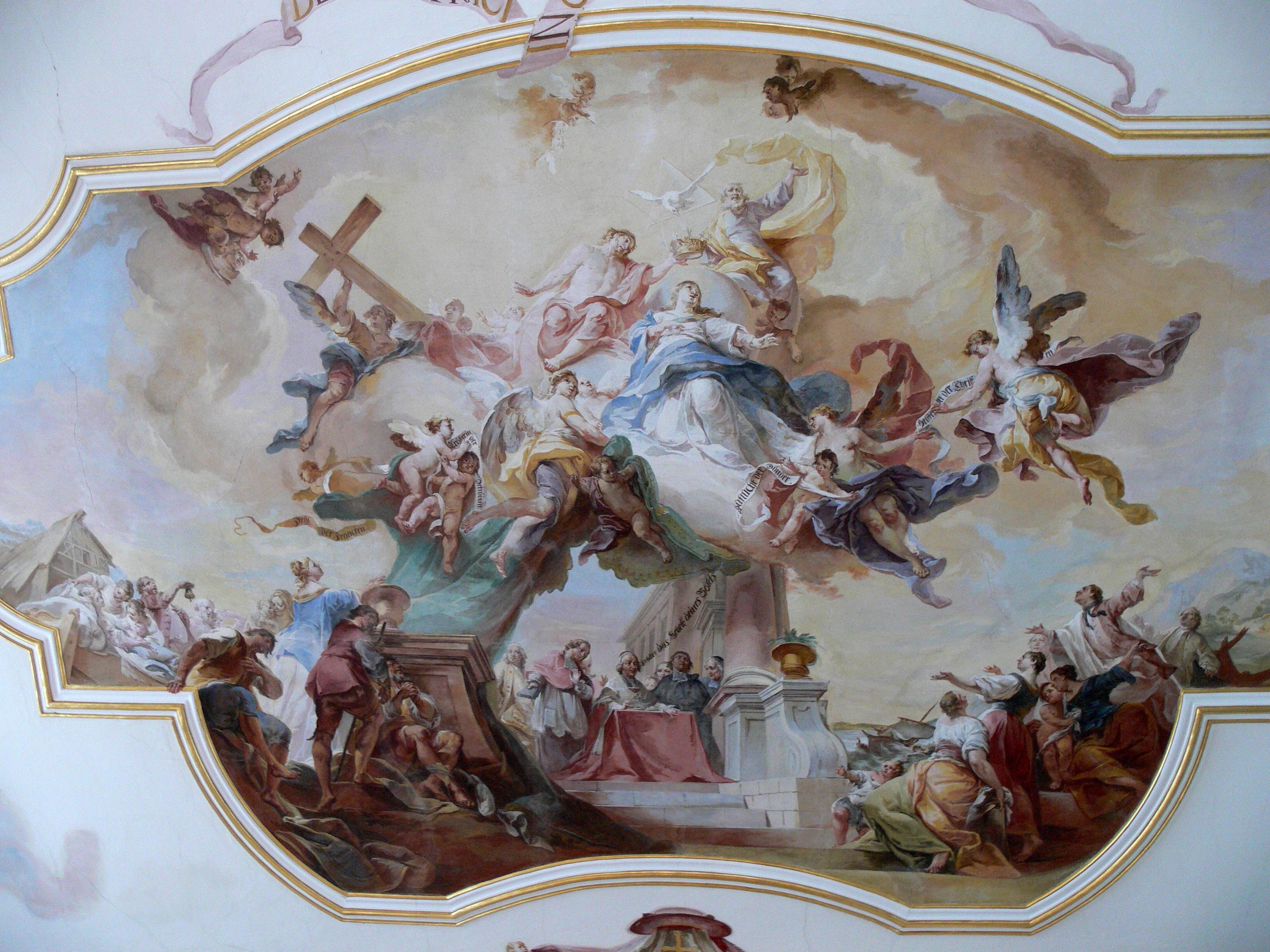 Fresko in der Vierung der Wallfahrtskirche Maria zum Berge Karmel, Baitenhausen, Stadt Meersburg, Bodenseekreis. Motiv: "Himmelfahrt und Krönung Mariens", 1760. Maler: Johann Wolfgang Baumgartner (1712–1761).